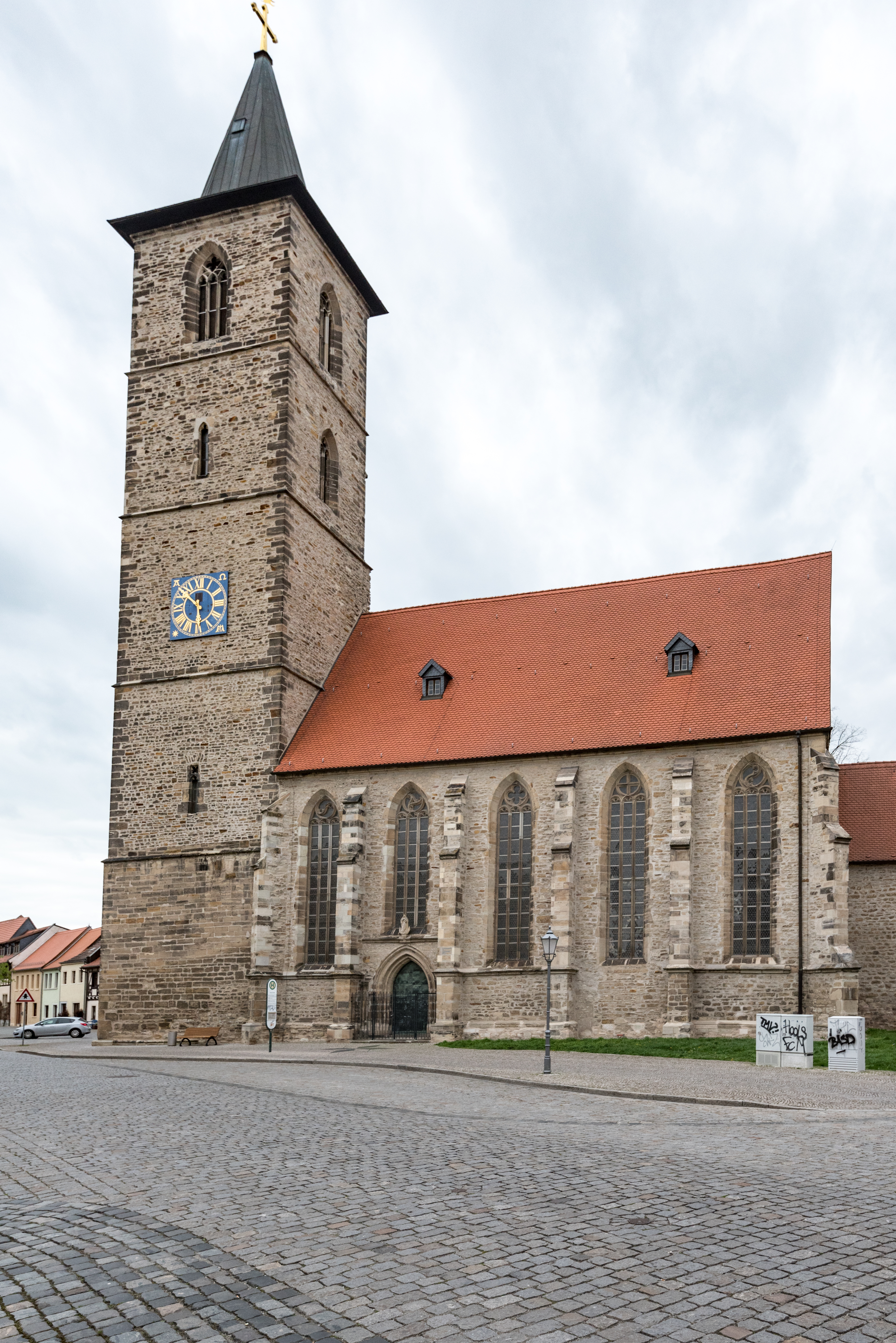 Bernburg (Saale), St. Nikolai